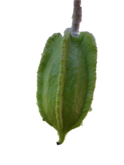 Cuaguayote, fruto de la Jacaratia mexicana o Pileus mexicanus; Bonete, K'umche, Papayón.